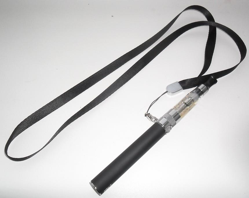 Elektronická cigareta